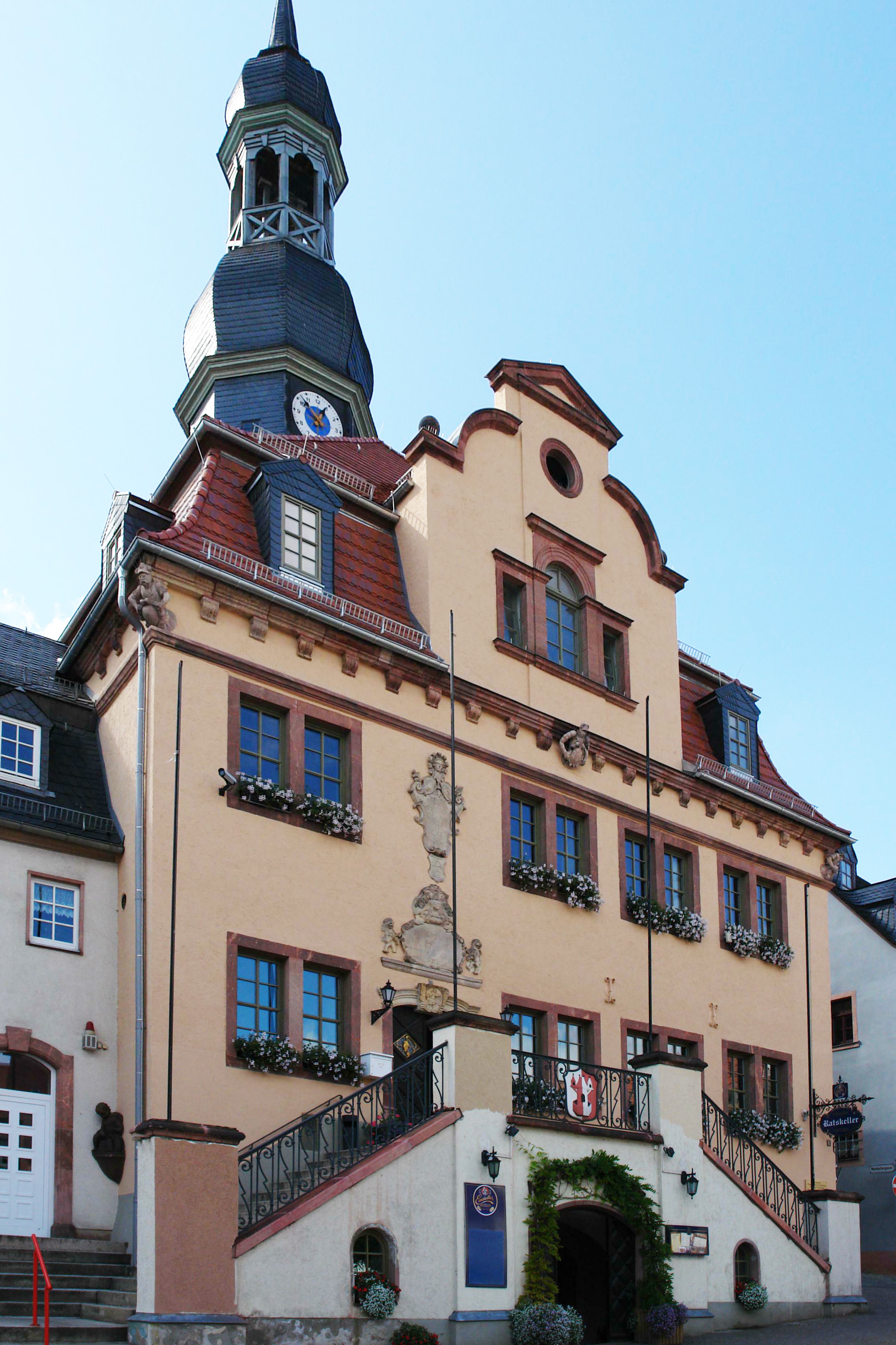 Rathaus Waldenburg (Sachsen)